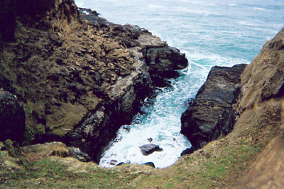 Acantilado en Slope Point, Nueva Zelanda